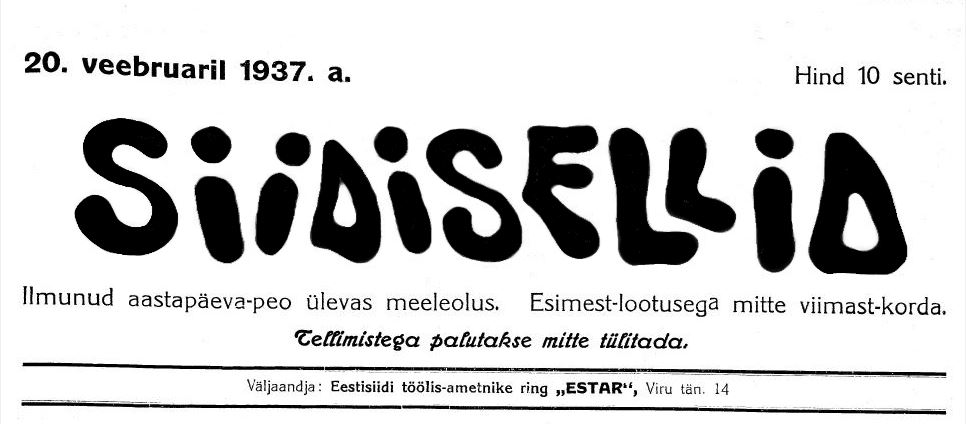 Ajalehe Siidisellid 1937 päis